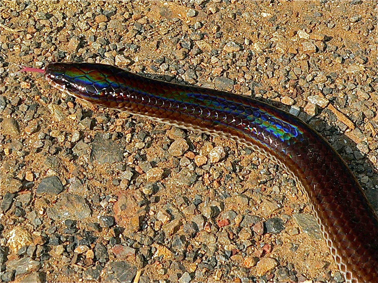 Khao Yai NP, THAILAND